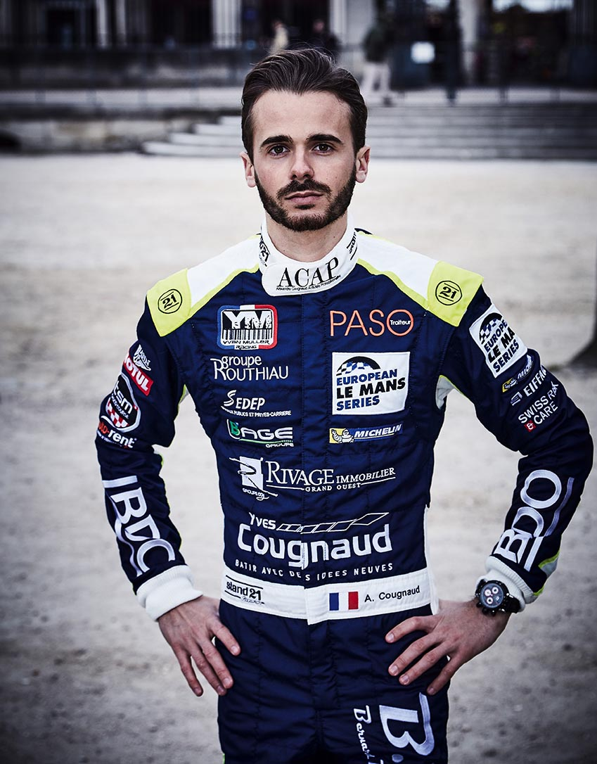 Alexandre Cougnaud dans sa combinaison ELMS 2016.